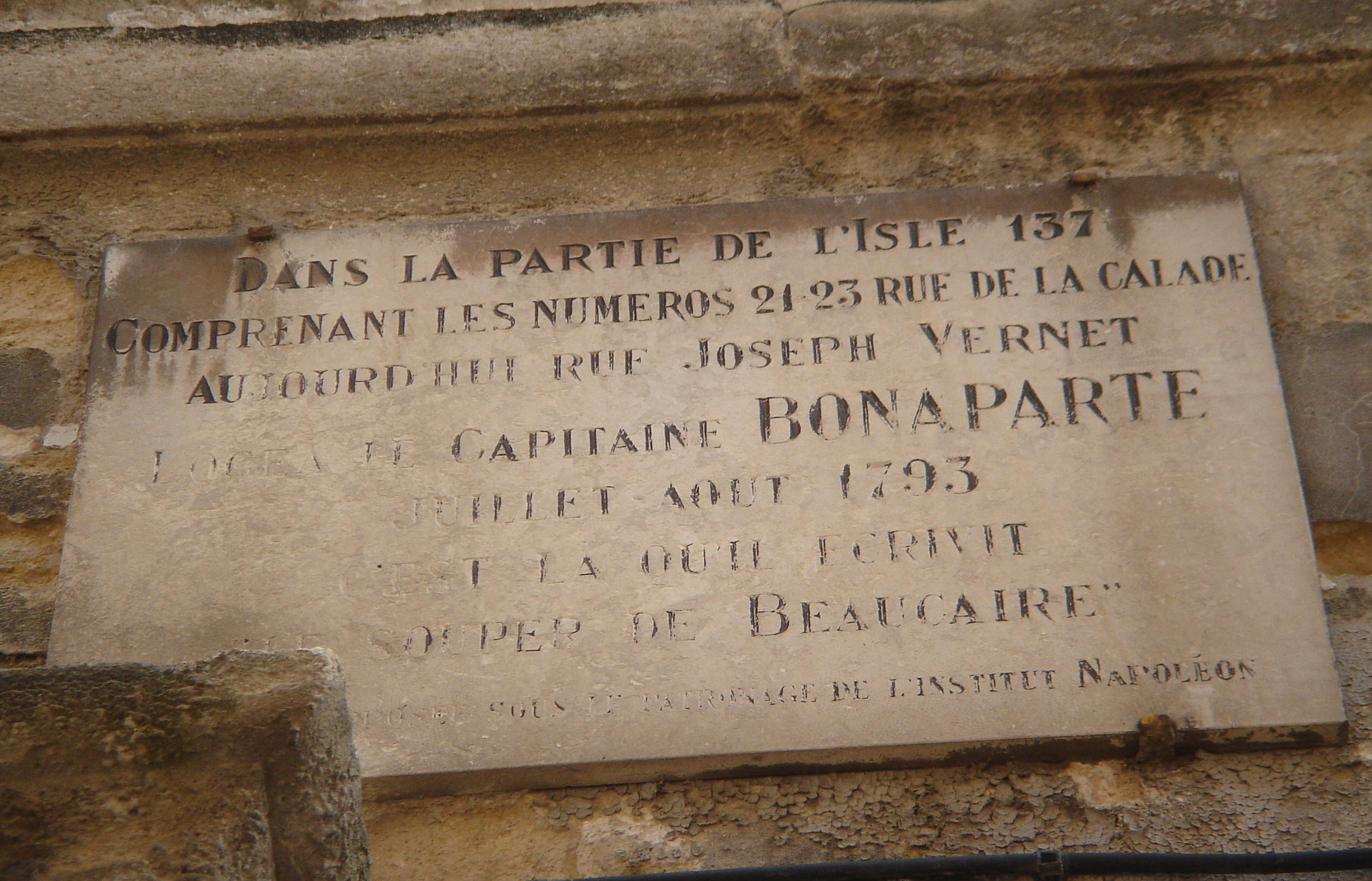 Plaque commemorative Maison Bouchet 22-23 rue Calade Avignon